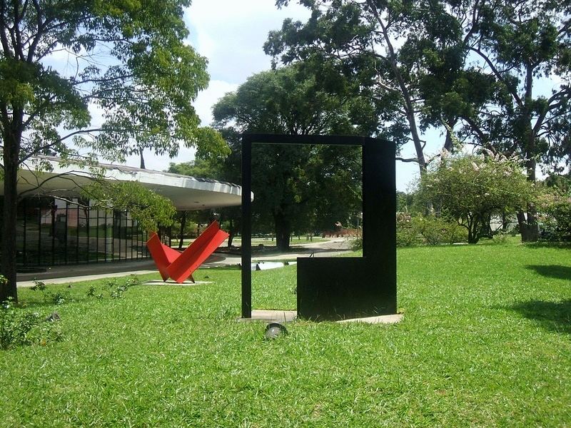 Obras de Franz Weissmann, no Jardim de Esculturas do Museu de Arte Moderna de São Paulo, no Parque do Ibirapuera.